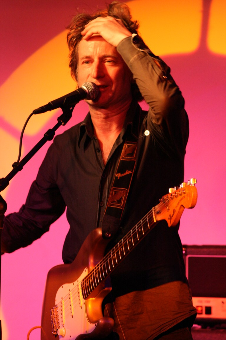 Gitarist van de Nederlandse rockband Vitesse